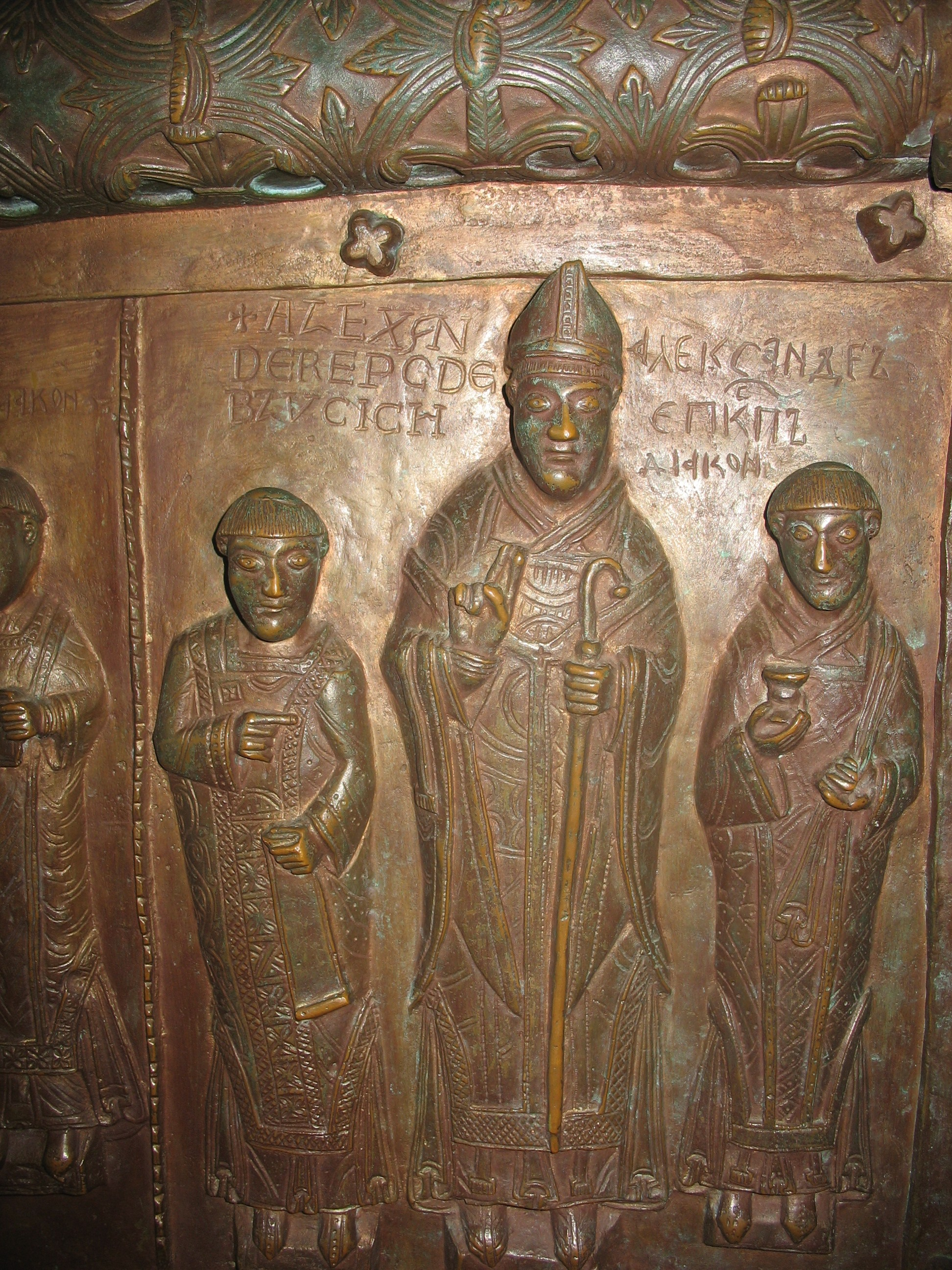 Fundator katedry płockiej - bp Aleksander z Malonne (jedna z kwater Drzwi Płockich)